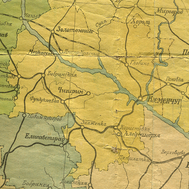 Кременчуцька губернія, фрагмент мапи Української соц. рад. республіки, листопад 1921